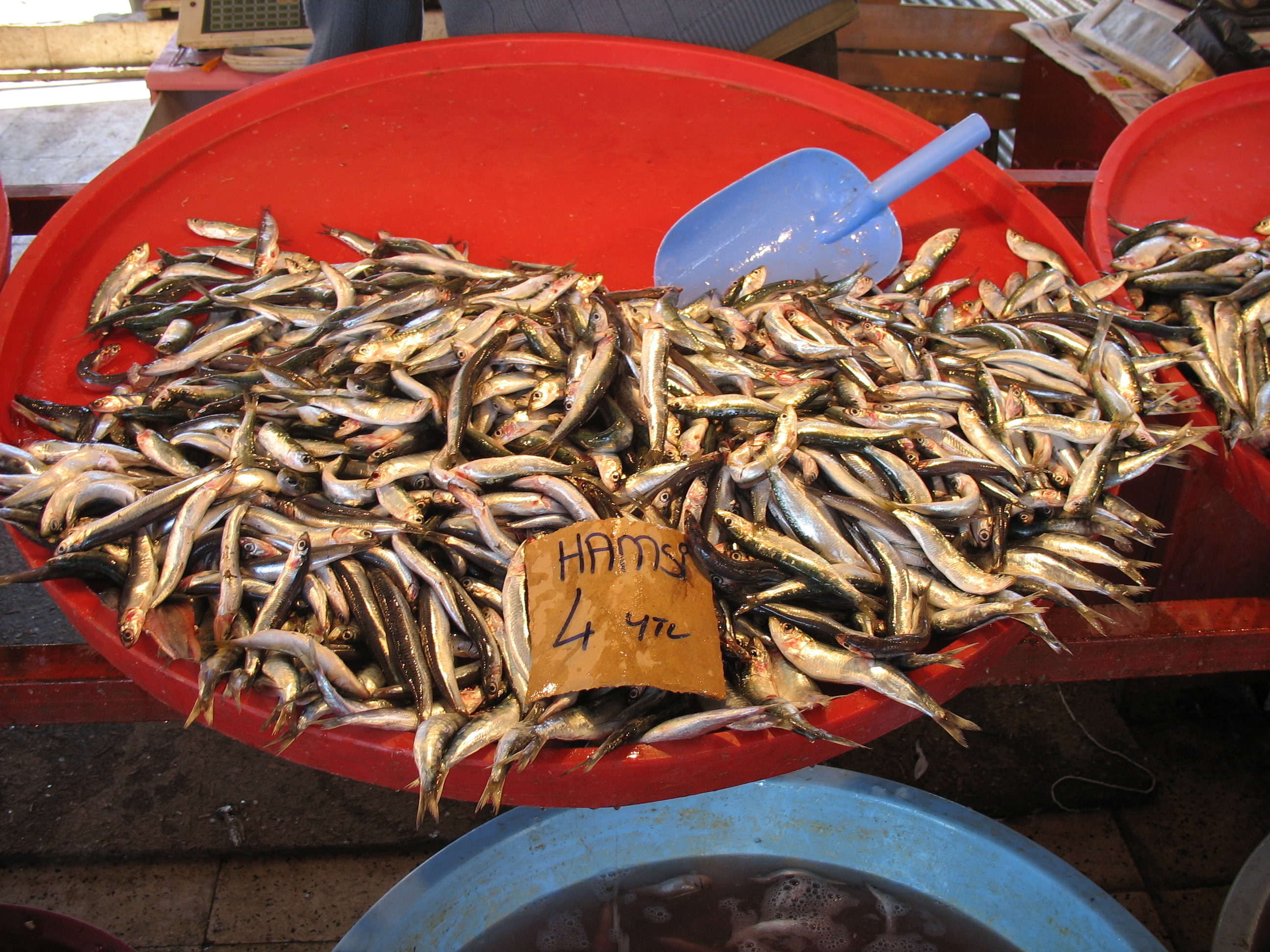 Pazarda hamsi